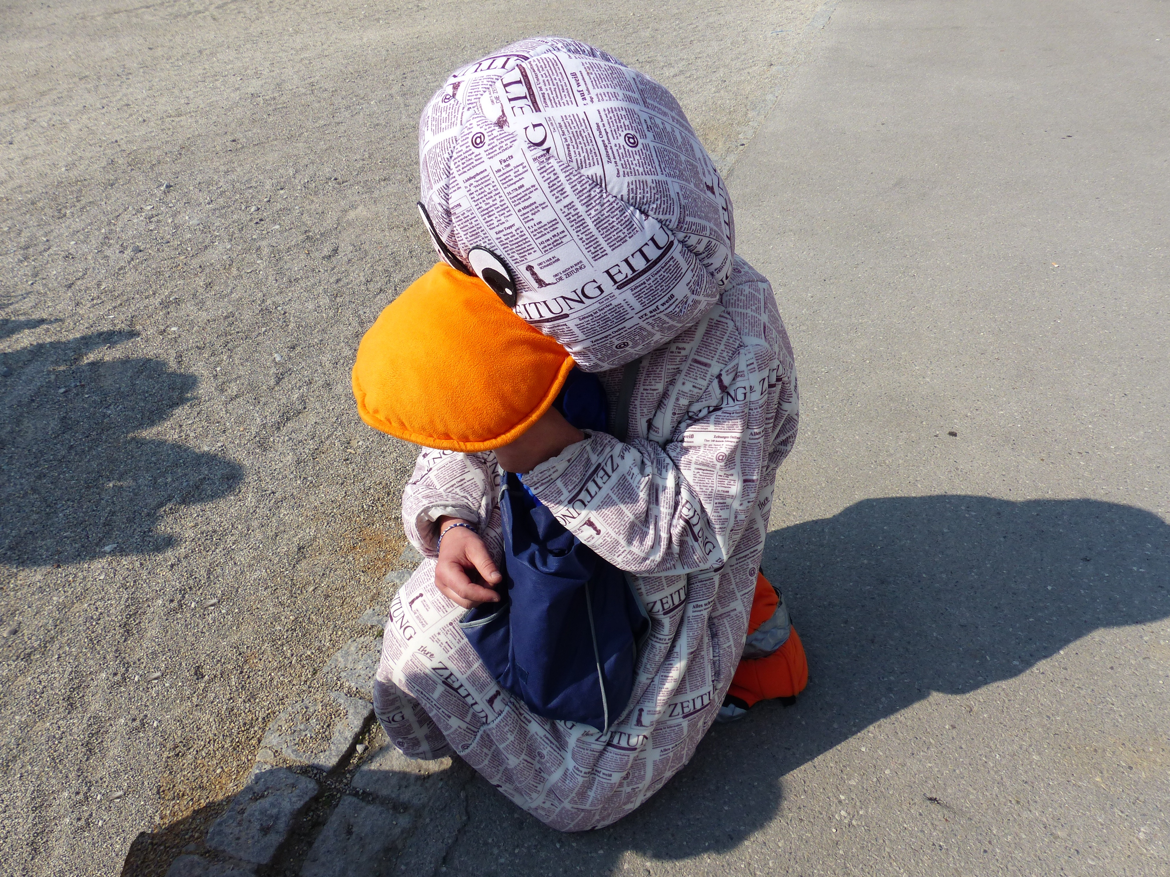 Zeitungsente, Entenkostüm